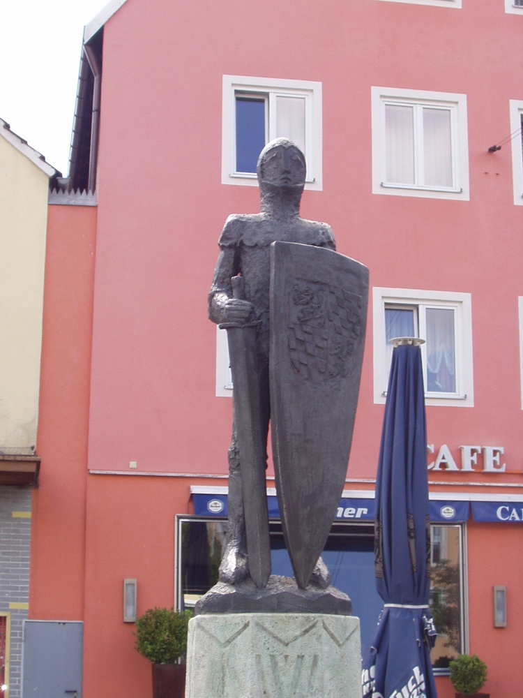 Brunnen mit Darstellung Johanns von Neumarkt am Unteren Markt, Neumarkt in der Oberpfalz